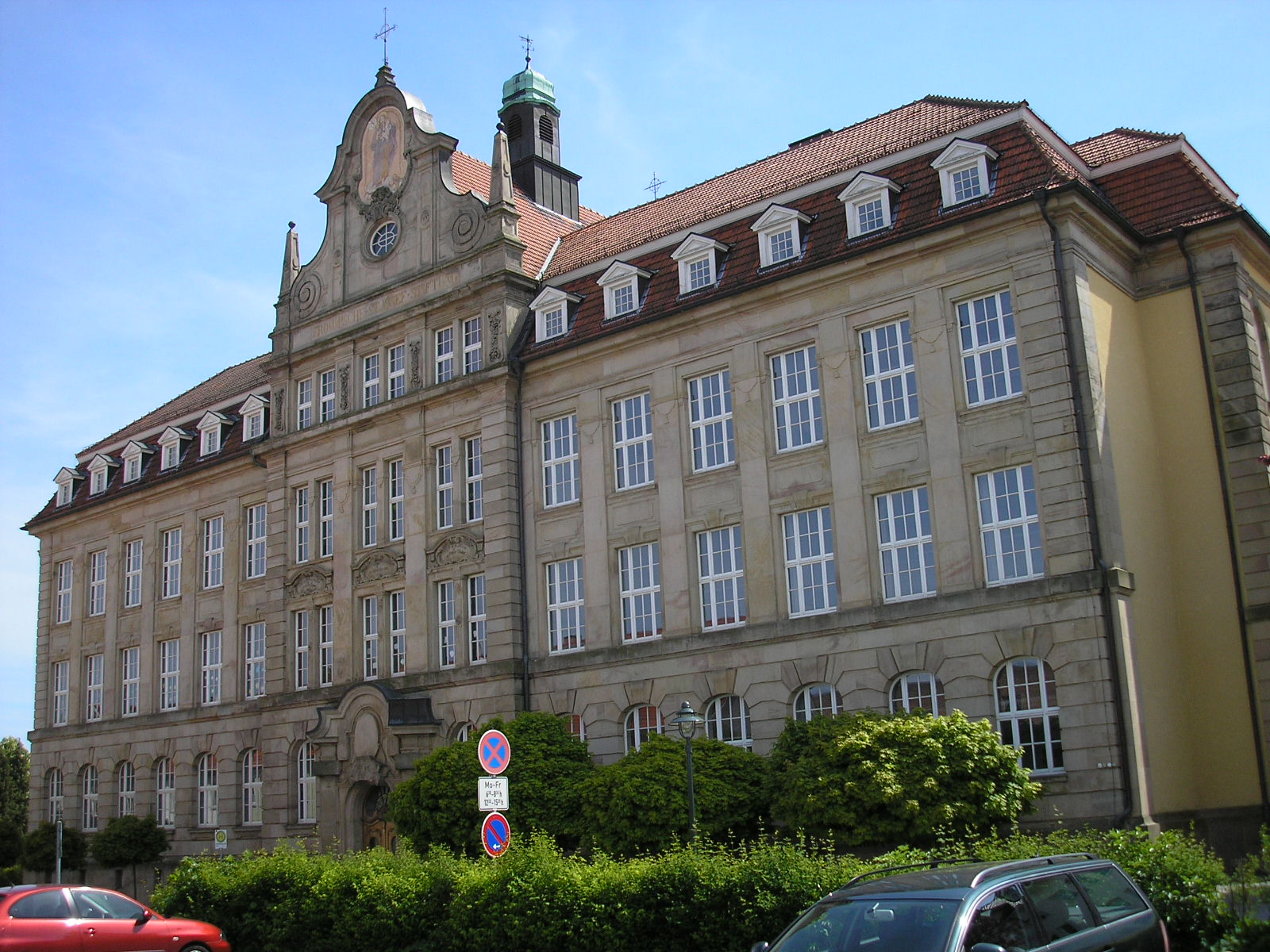 Das Gymnasium in Dingelstädt im Eichsfeld (Thüringen).